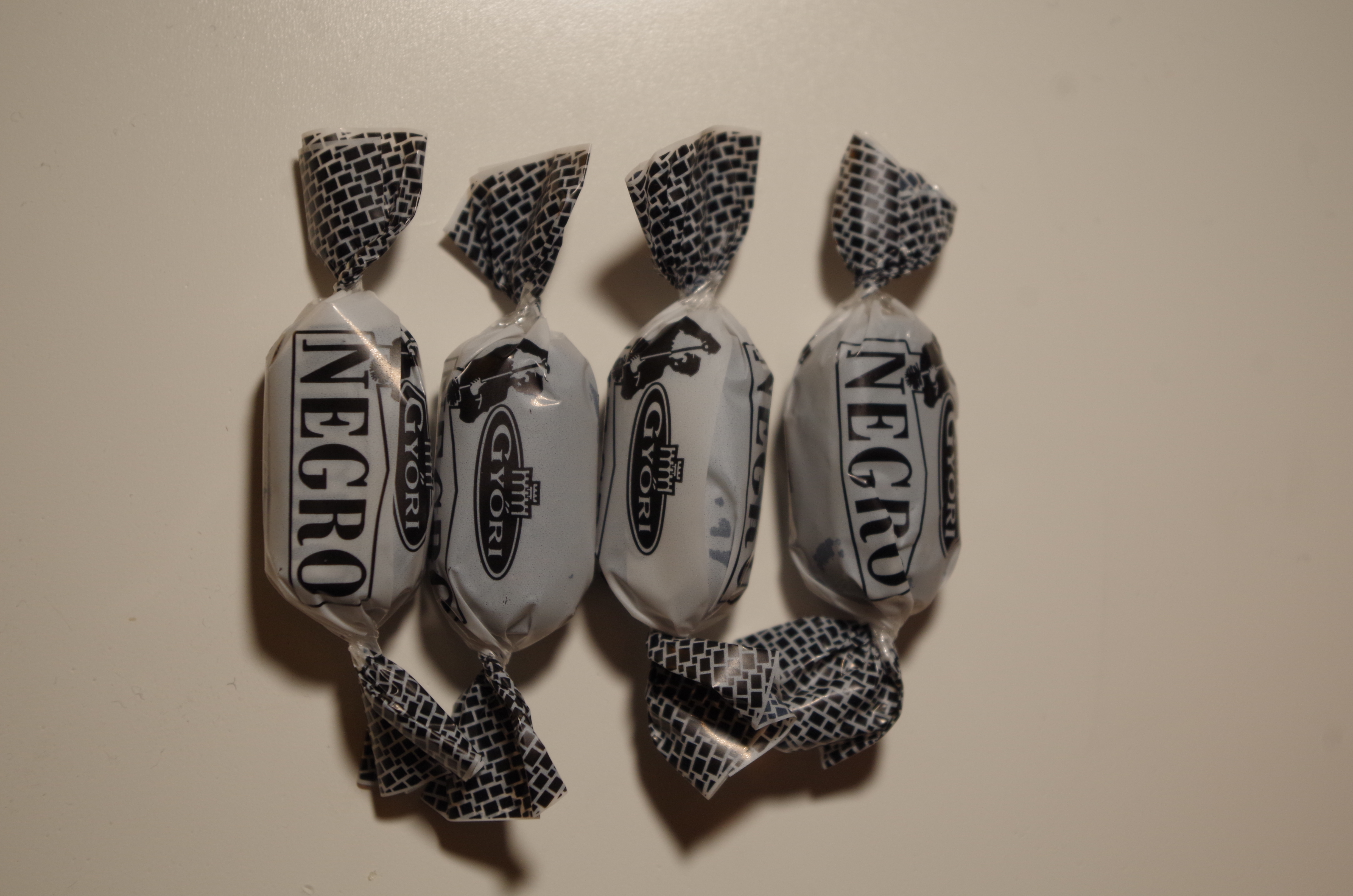 Ungari Győris toodetud Negro kompvekid